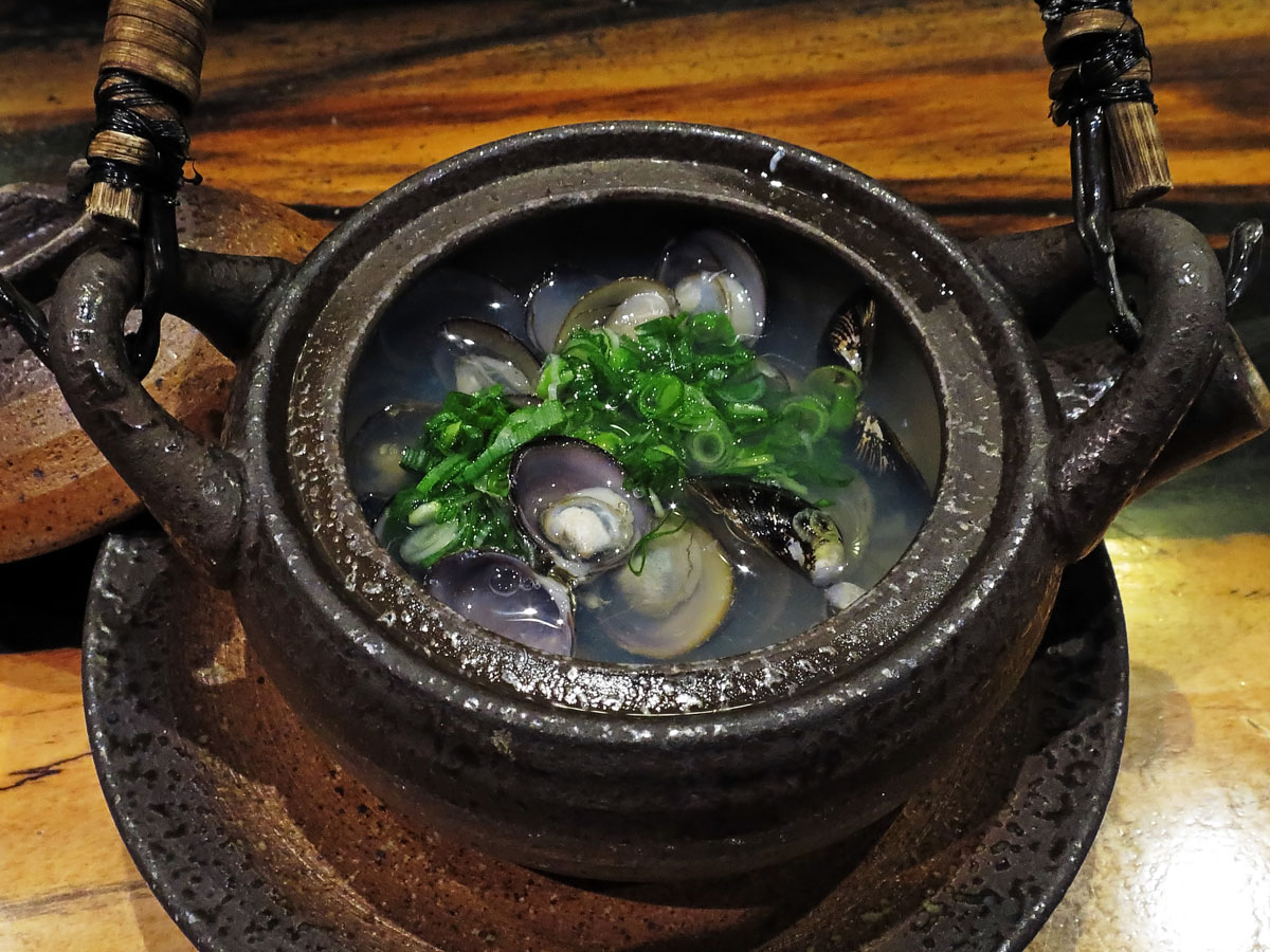 YamatoShijimi01.jpg